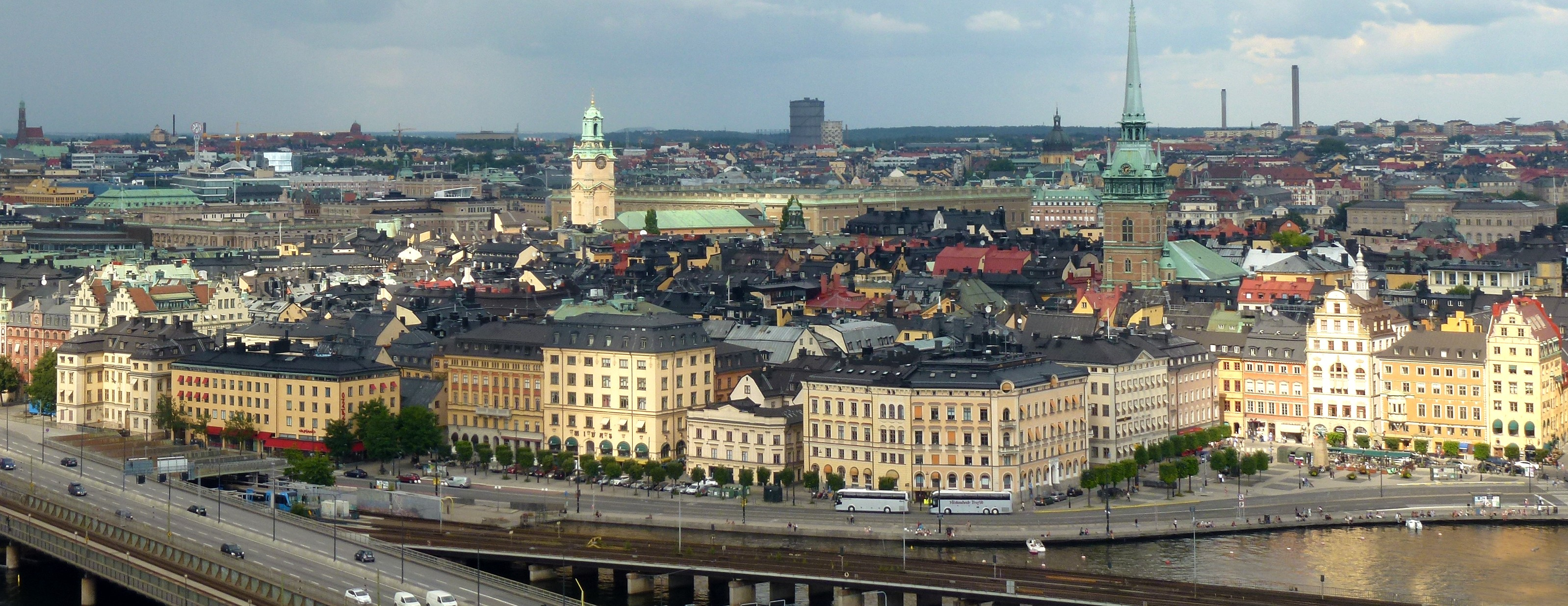 Gamla stan med Munkbroleden från Mariakyrkan